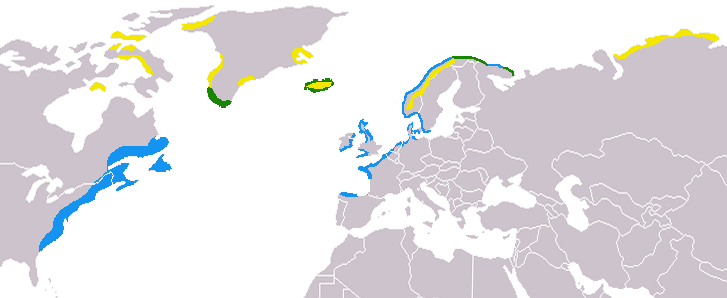 Utgick från Image:Calidris maritima map.png av Andreas Trepte men med förändrad utbredning i skandinavien enligt Fågelguiden, Europas och medelhavsområdets fåglar i fält., Mullarney, K. Svensson, L. Zetterström, D. (1999) Stockholm: Albert Bonniers förlag